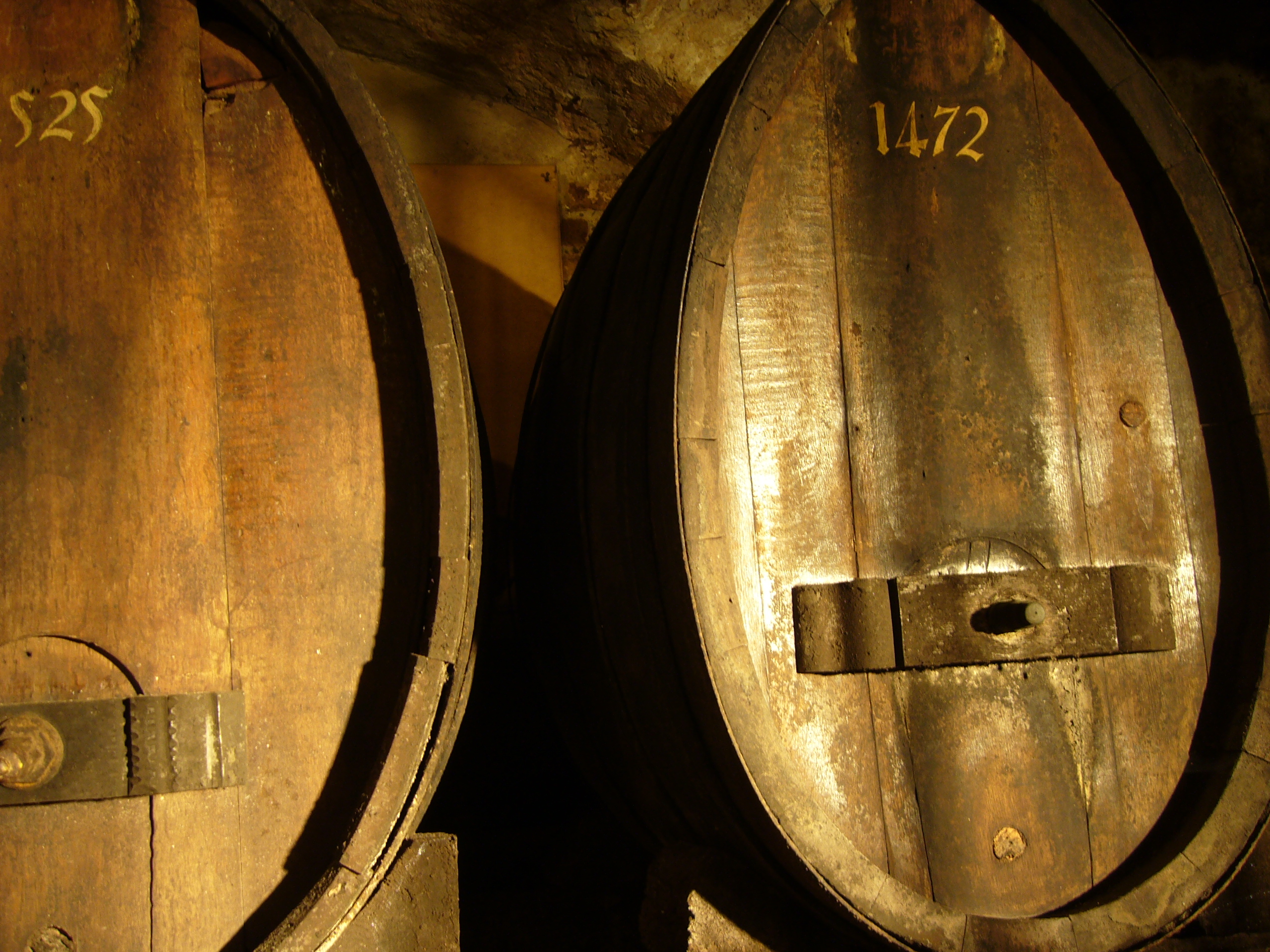 La cave des hospices civils de Strabourg (tonneau de 1472)